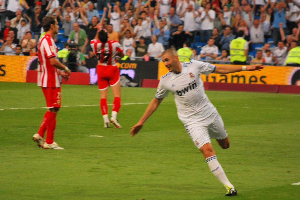 Karim Benzema célébrant un but lors d'un match entre le Real Madrid et l'UD Almería.